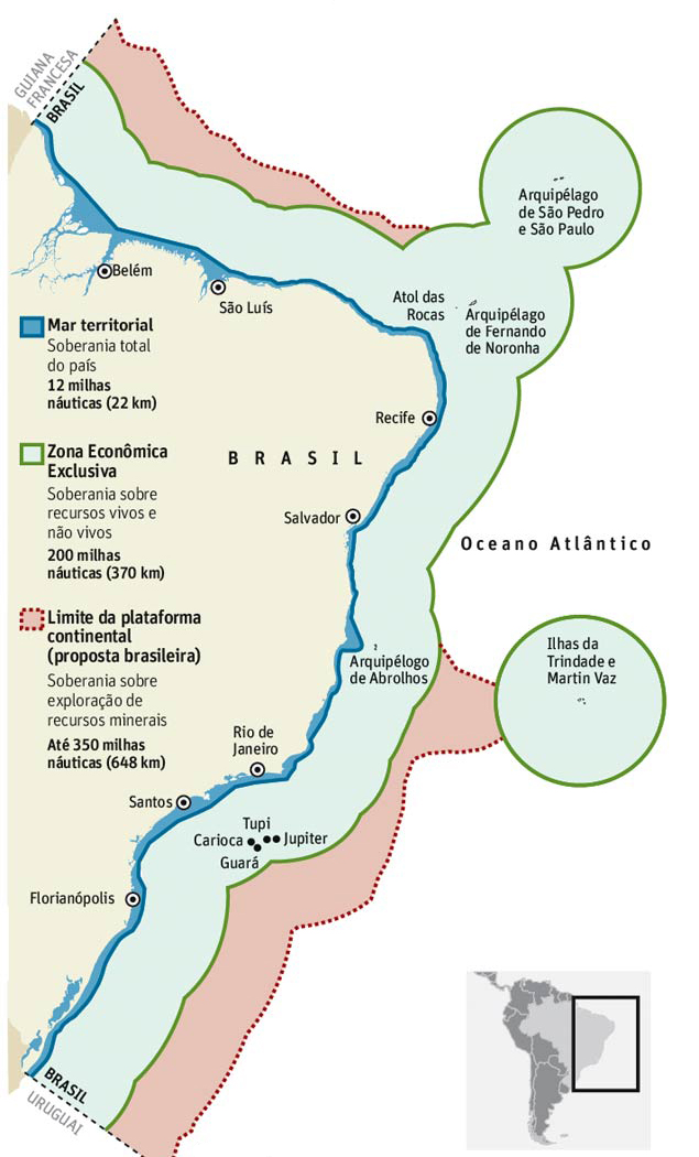 Carte en portugais du plateau continental, de la Zone économique exclusive (ZEE) et de la Zone de pêche exclusive (ZPE) du Brésil.